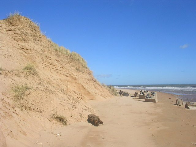 Sand dunes on Balmedie Beach, Balmedie, Aberdeenshire